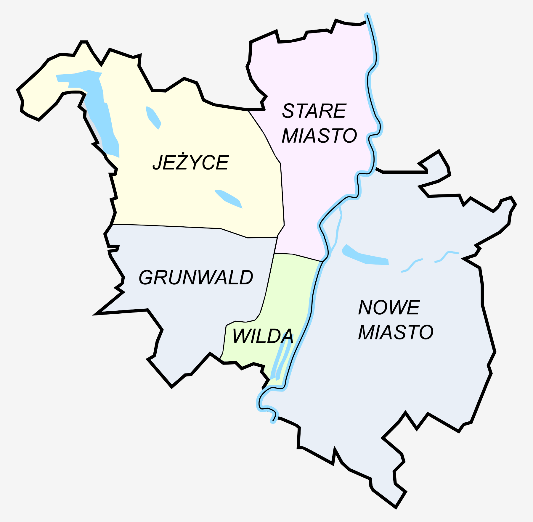 Dawne dzielnice administracyjne Poznania w latach 1987–1990, po przyłączeniu wsi: Kiekrz, Morasko, Umultowo, części Plewisk (Os. Kwiatowe)